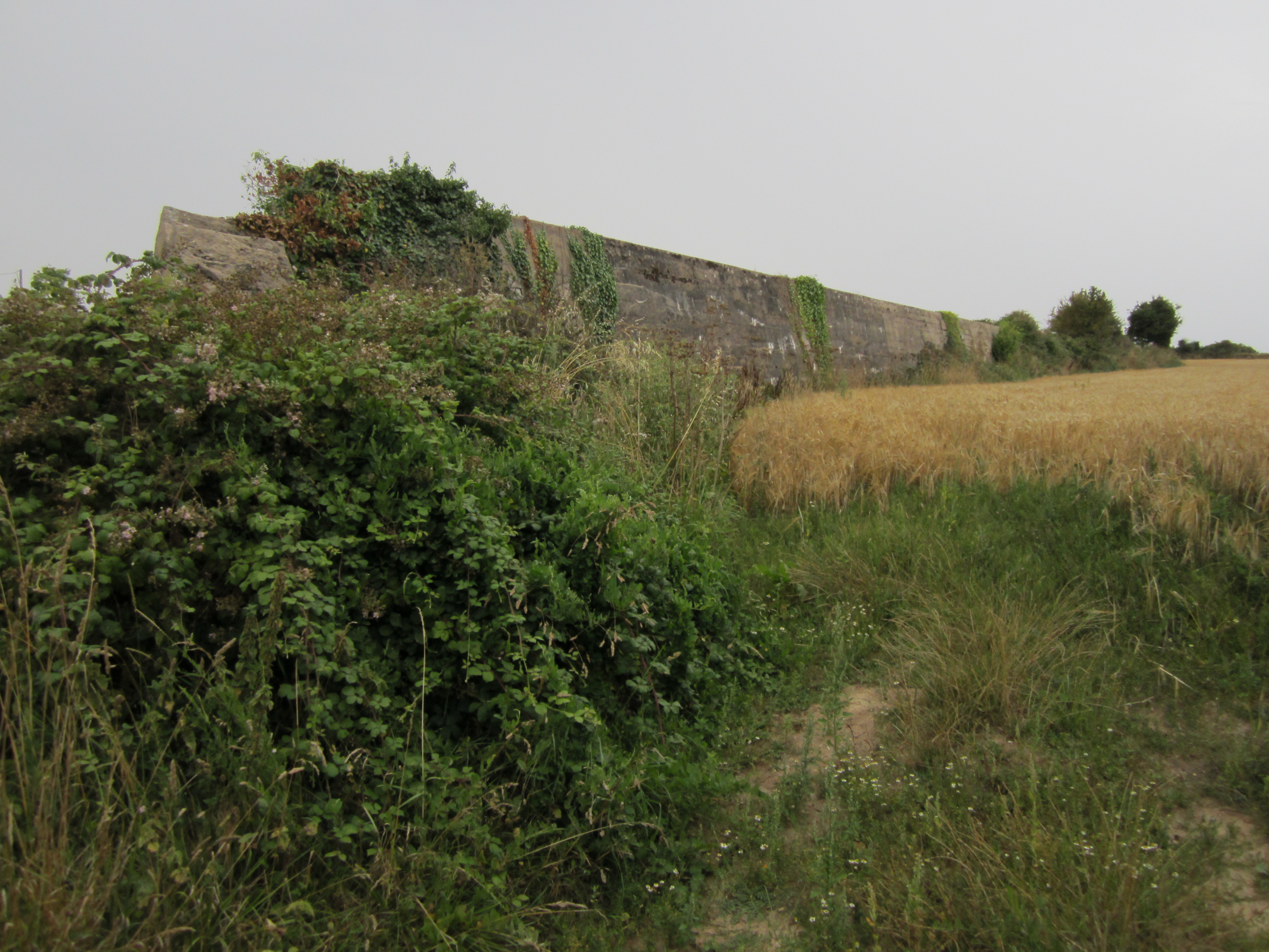 Gare de Gatteville - Il s'agit d'un quai de chargement construit par les allemands (organisation Todt) fin 42 pour emporter le sable de extrait du cordon dunaire de Gattemare vers Cherbourg. Les camions montaient sur la rampe et déversaient le sable dans les wagons